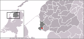 Kaart met de locatie van Hemelum, gemaakt uit sjabloon van Wikipedia-gebruiker Mtcv